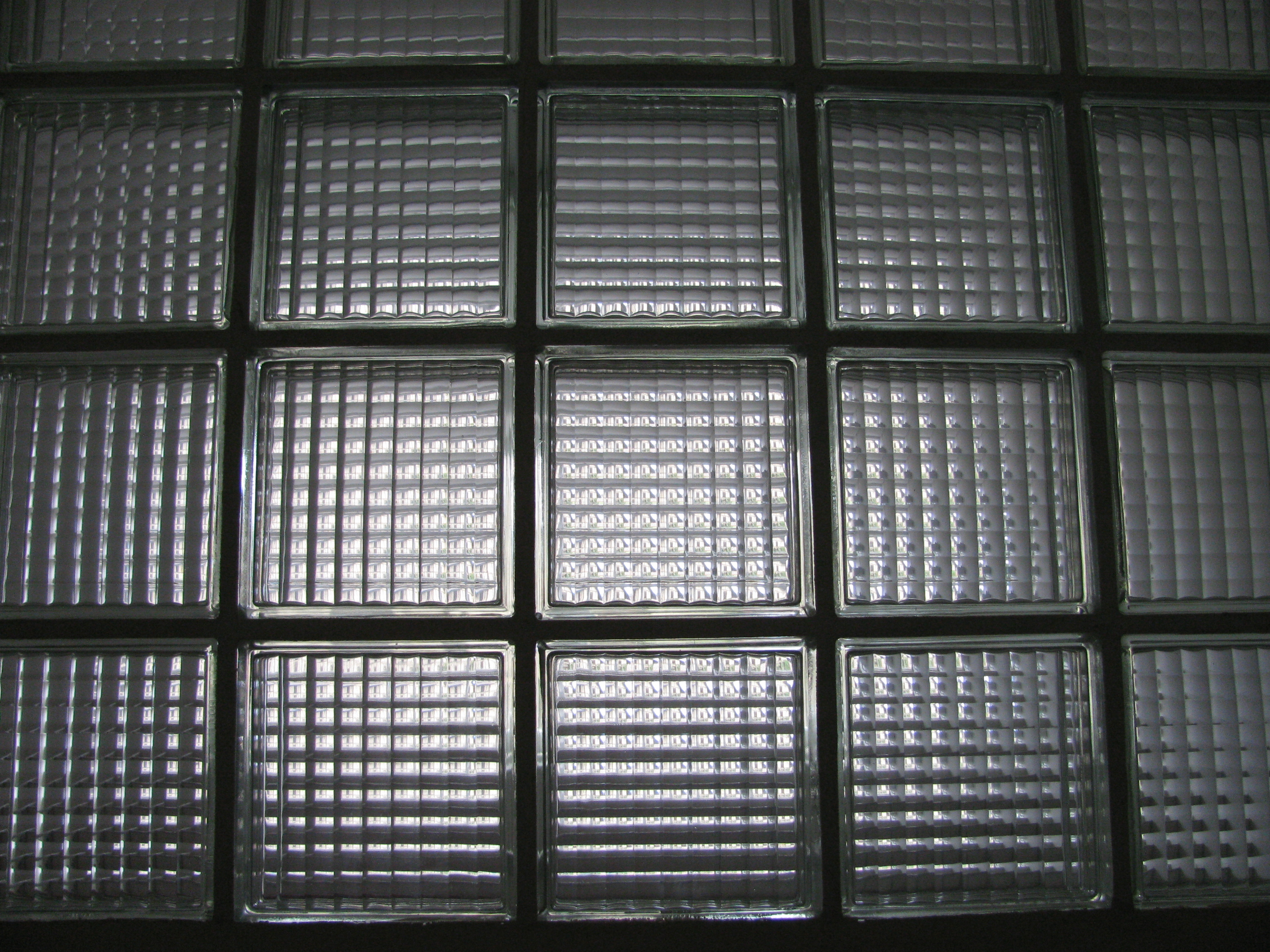 Deutschland - Baden-Württemberg - Bodenseekreis - Kressbronn am Bodensee: Alte Festhalle, Zwischenwand